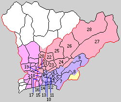 高知県香美郡の町村制時点の町村。